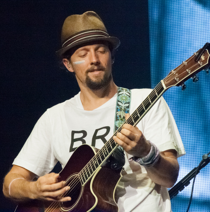 © Megan Carew 2013